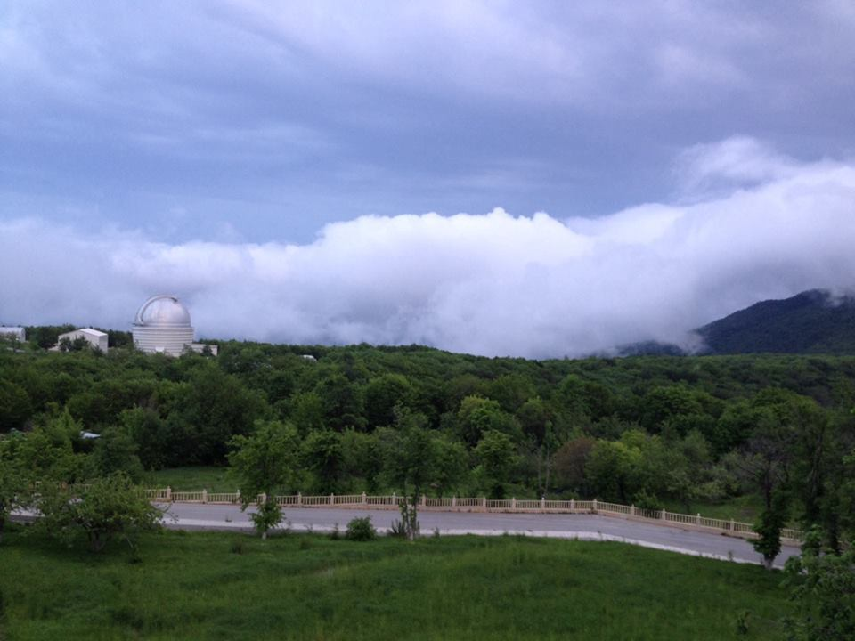 jbkjhkjb